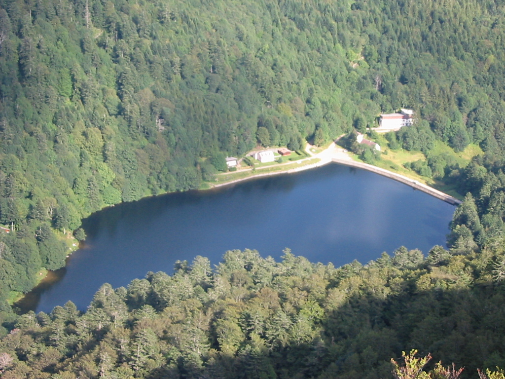 Lac situé au pied du Hohneck, côté alsacien Département du Haut-Rhin (France)